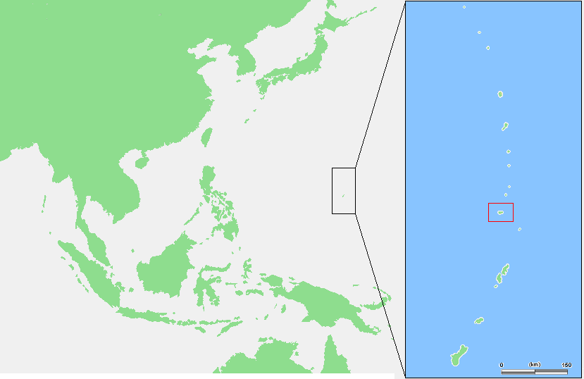 Mariana Islands - Anatahan.PNG